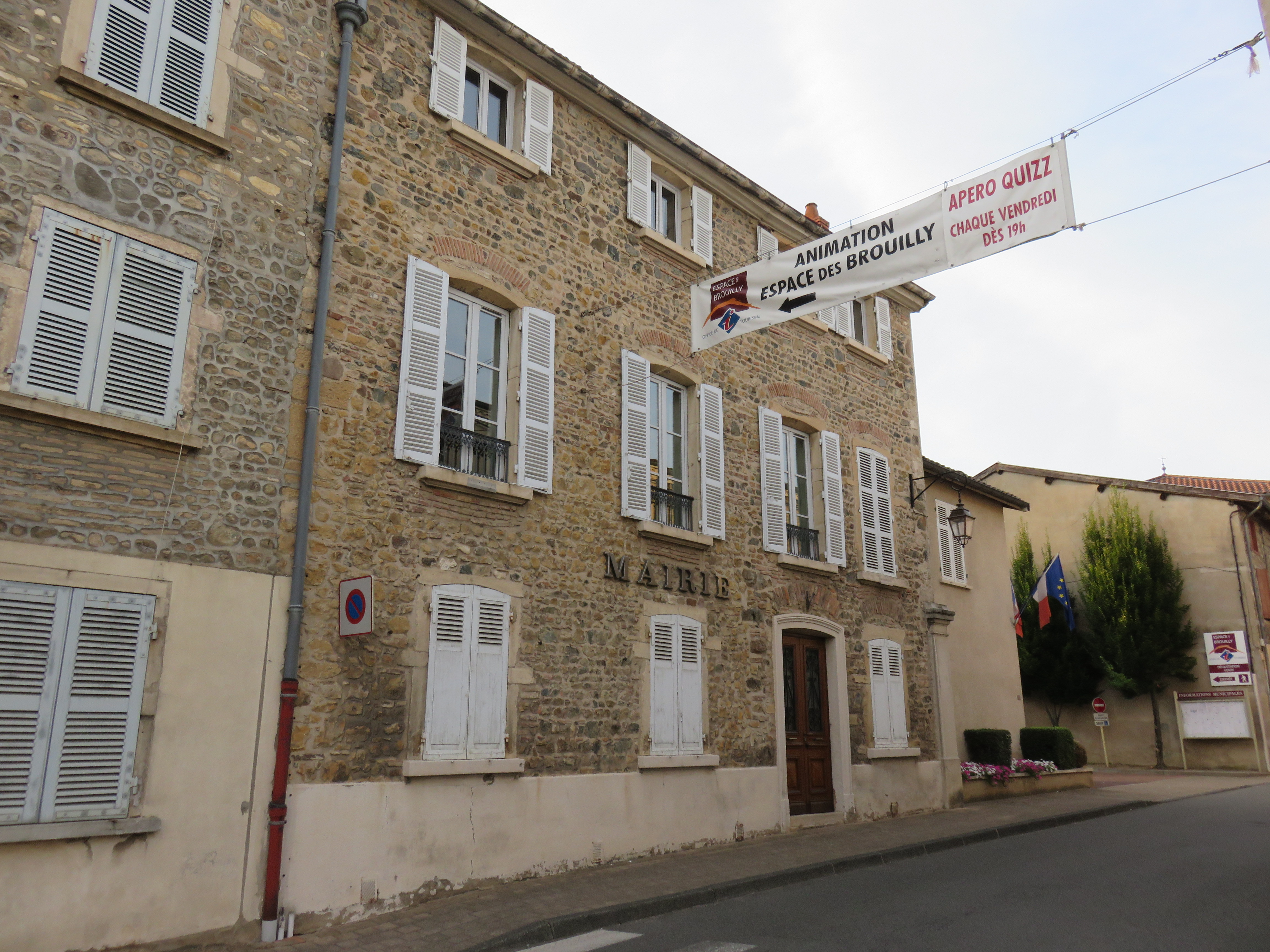 Mairie de Saint-Lager (Rhône, France).